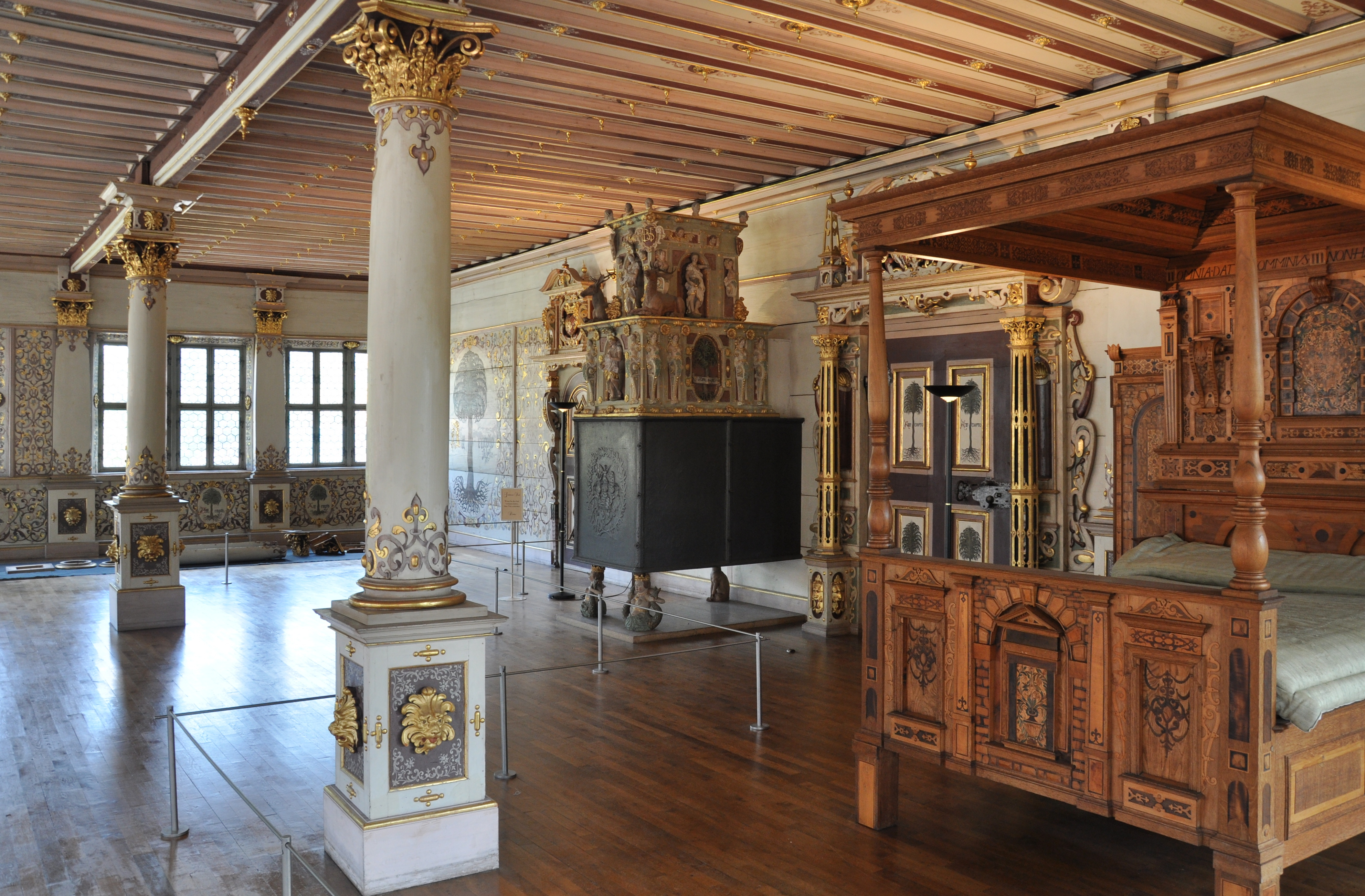 Schloss Urach, Goldener Saal